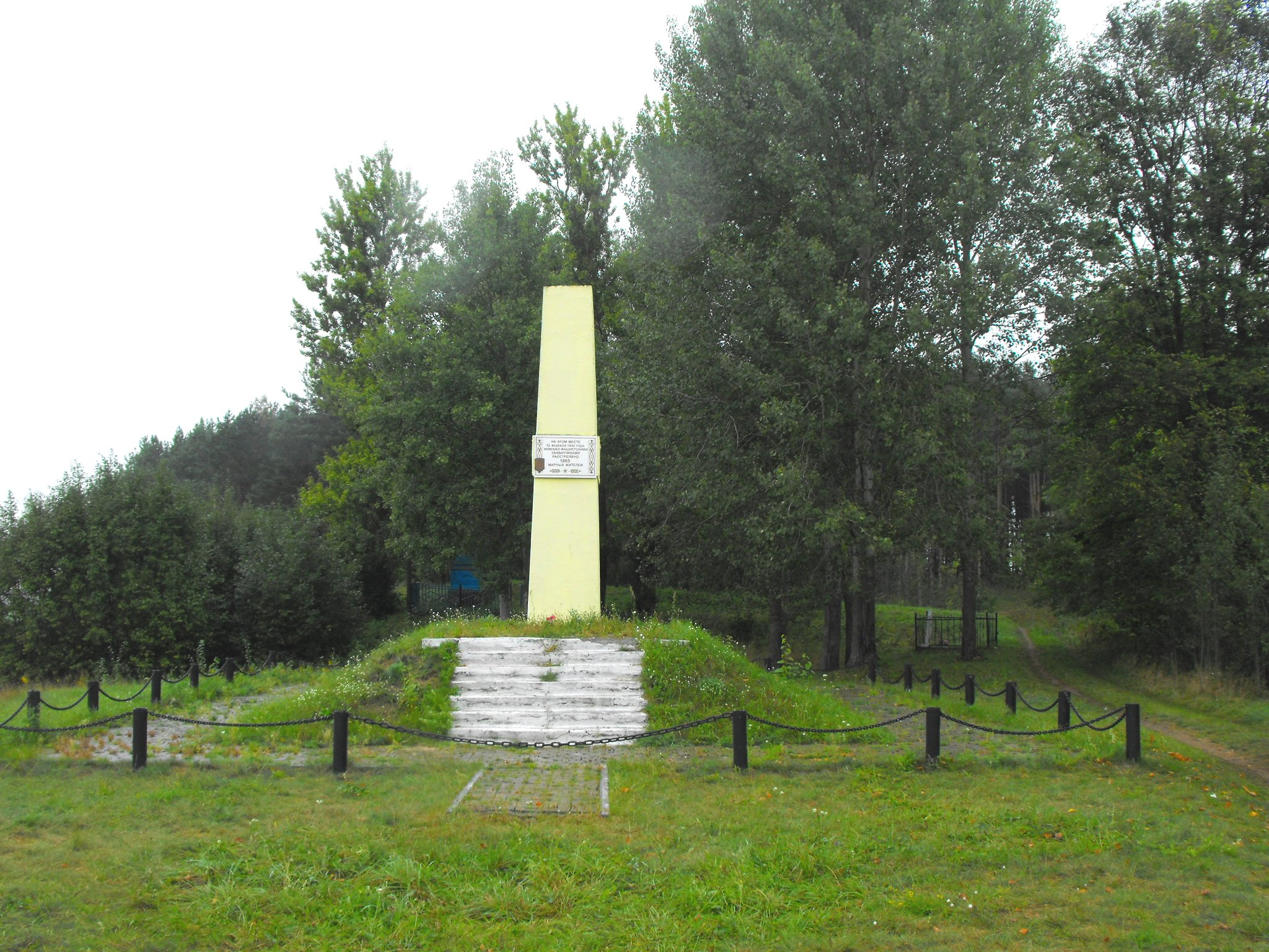 Памятник евреям из гетто в Чашниках, убитых нацистами и коллаборационистами. Установлен в деревне Заречная Слобода (Чашникский район, Витебская область).